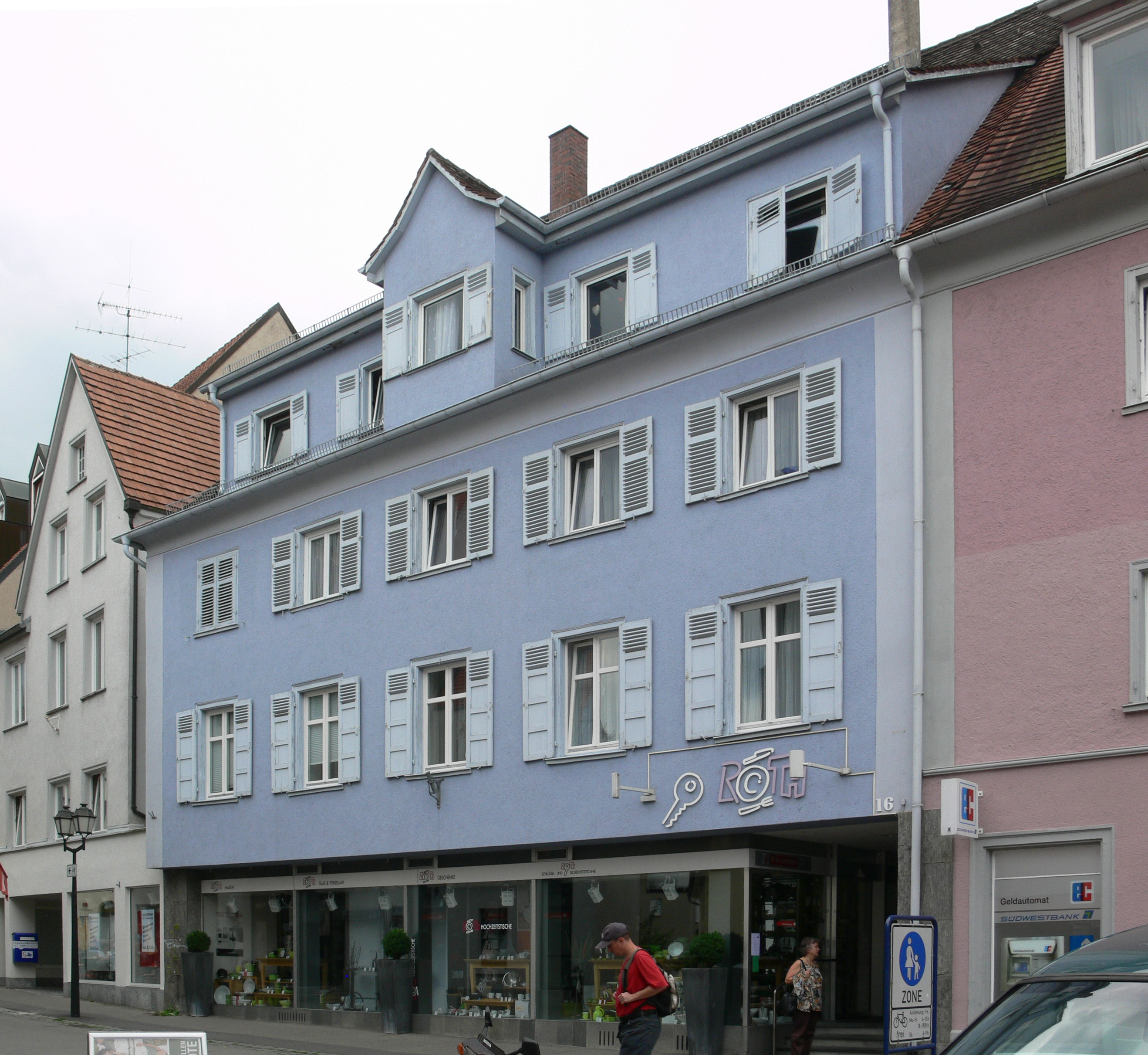 Weingarten (Württemberg), Kirchstraße 16, ehem. Wohnhaus Erwin Rommels